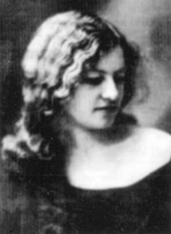 Herminia Fariña nos seus anos mozos